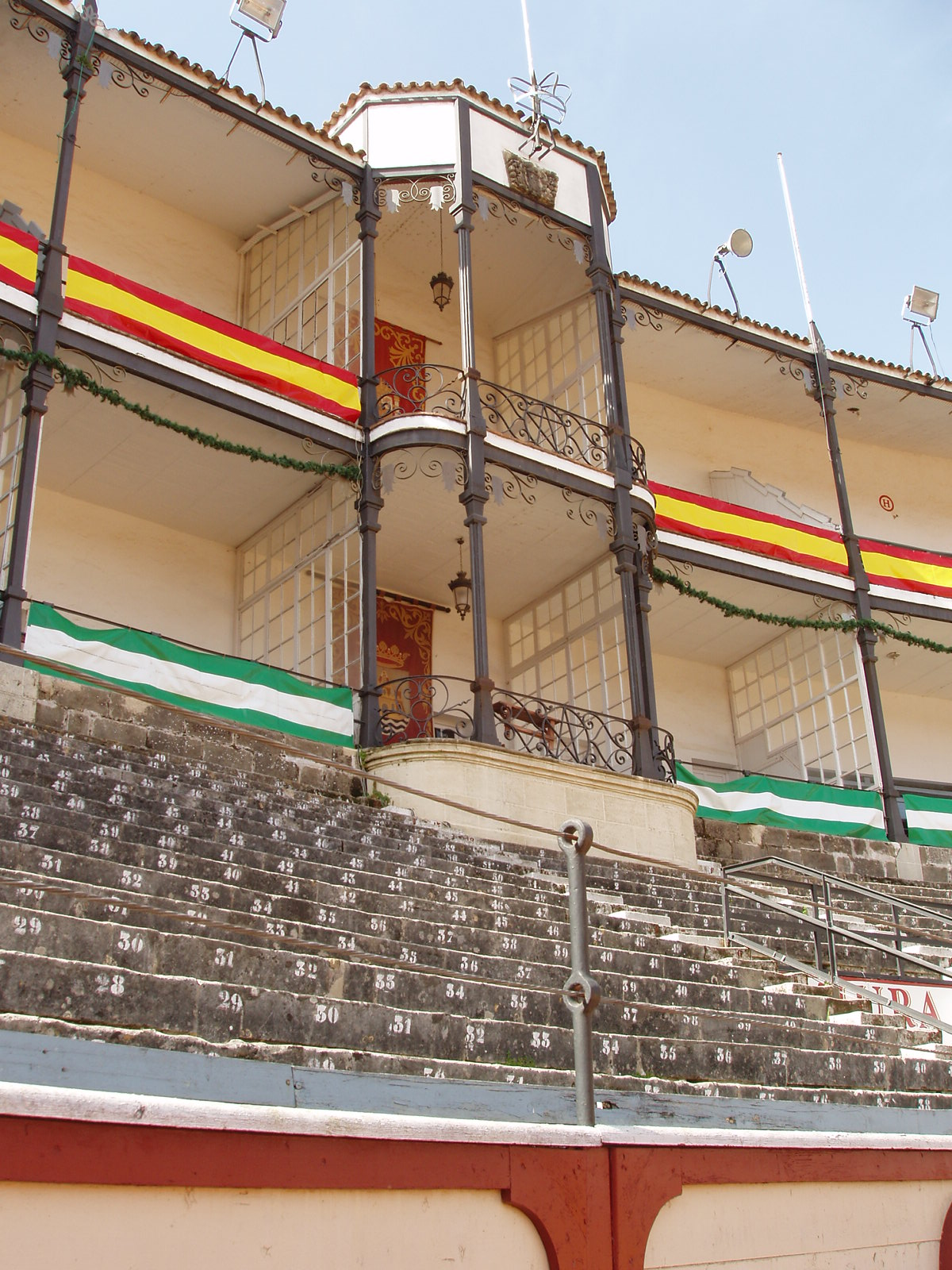 Plaza de Toros de El Puerto de Santa María